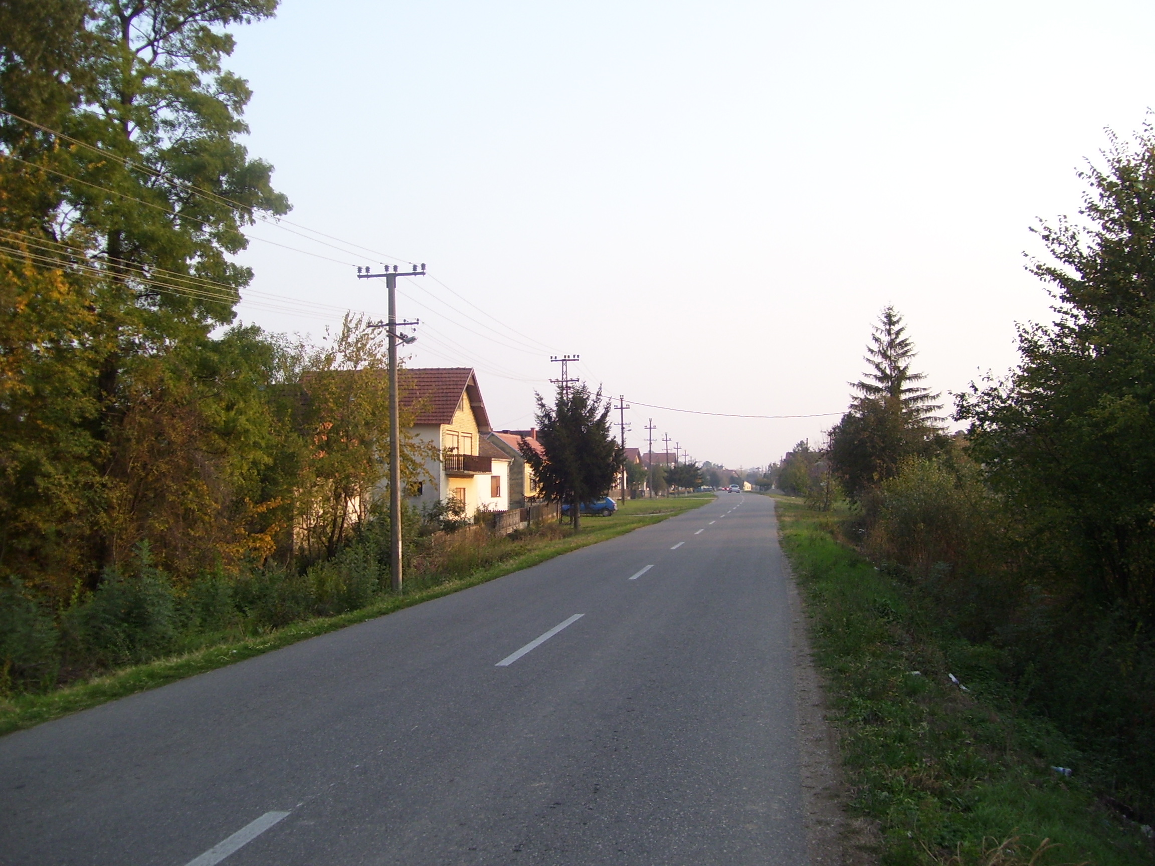 Аутор слике је корисник:SRB Maric IT Слика је урађена обичним фотоапаратом. Датум: 25-10-2011.